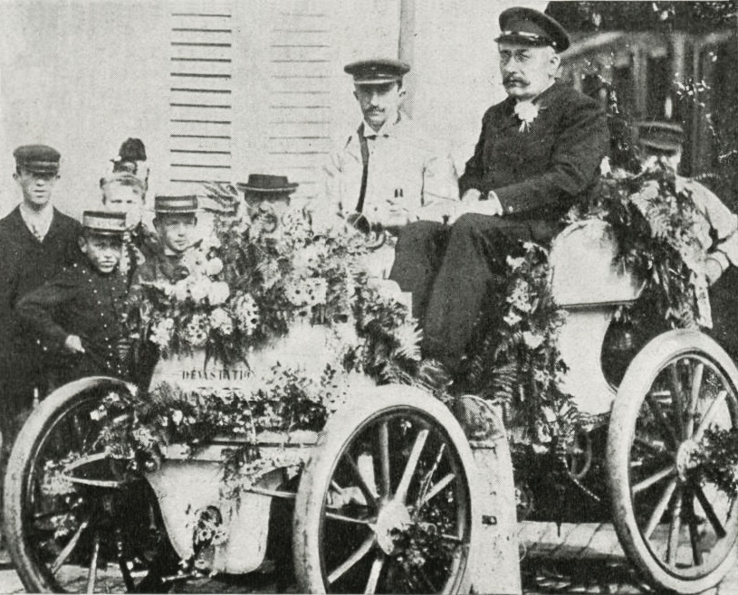 Pierre de Crawhez, vainqueur de Bruxelles-Spa en juin 1898 sur Panhard & Levassor - La Vie au Grand Air du 15 juillet 1898, p.92